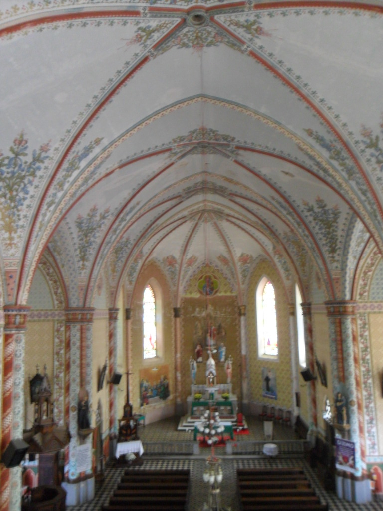 Igreja de Santo Estanislau, Itaiópolis, Santa Catarina